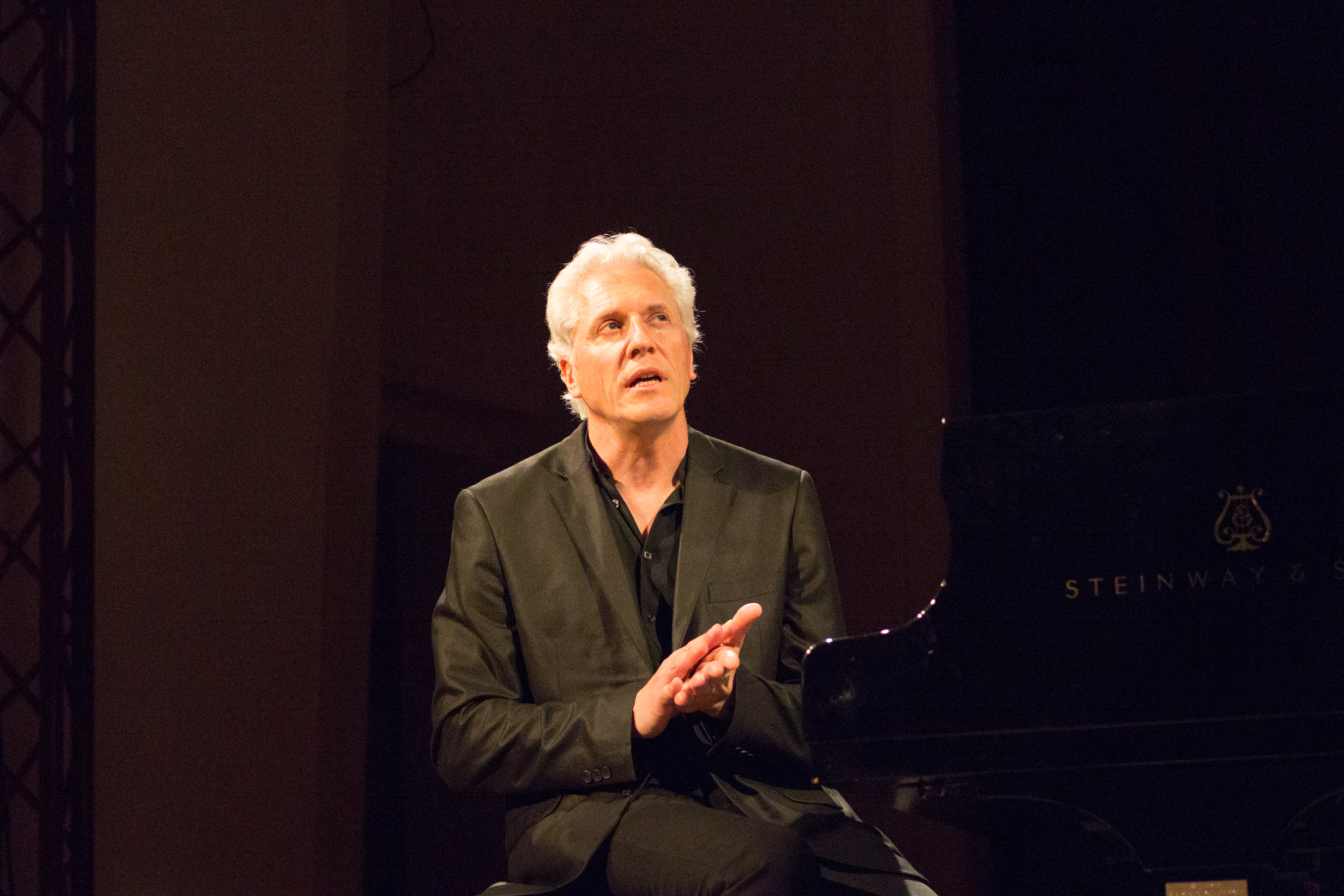 Stephan Oliva, ranskalainen pianisti